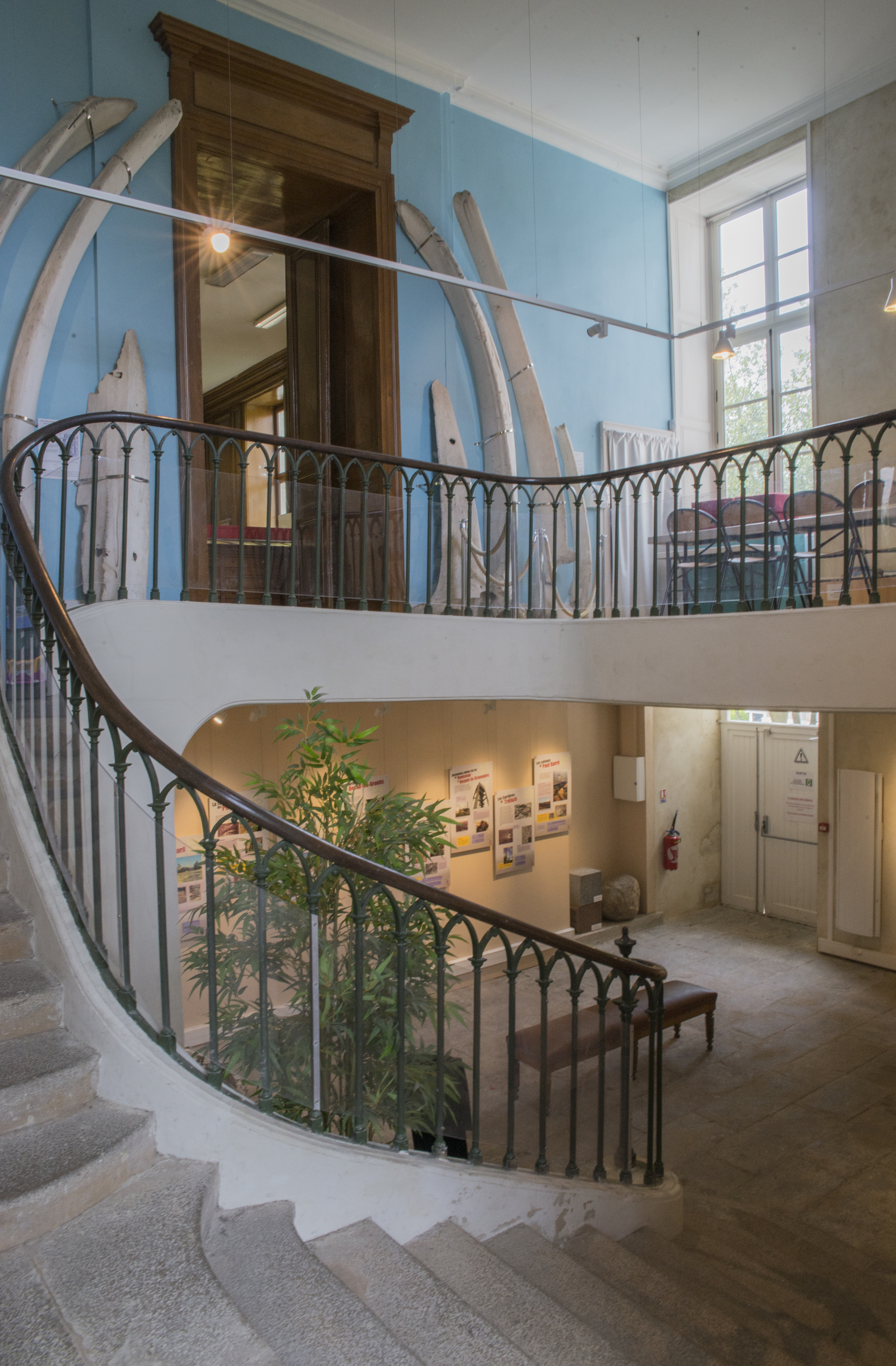 Escalier de paléontologie du Muséum des sciences naturelles d'Angers (Maine-et-Loire, France), 2017.